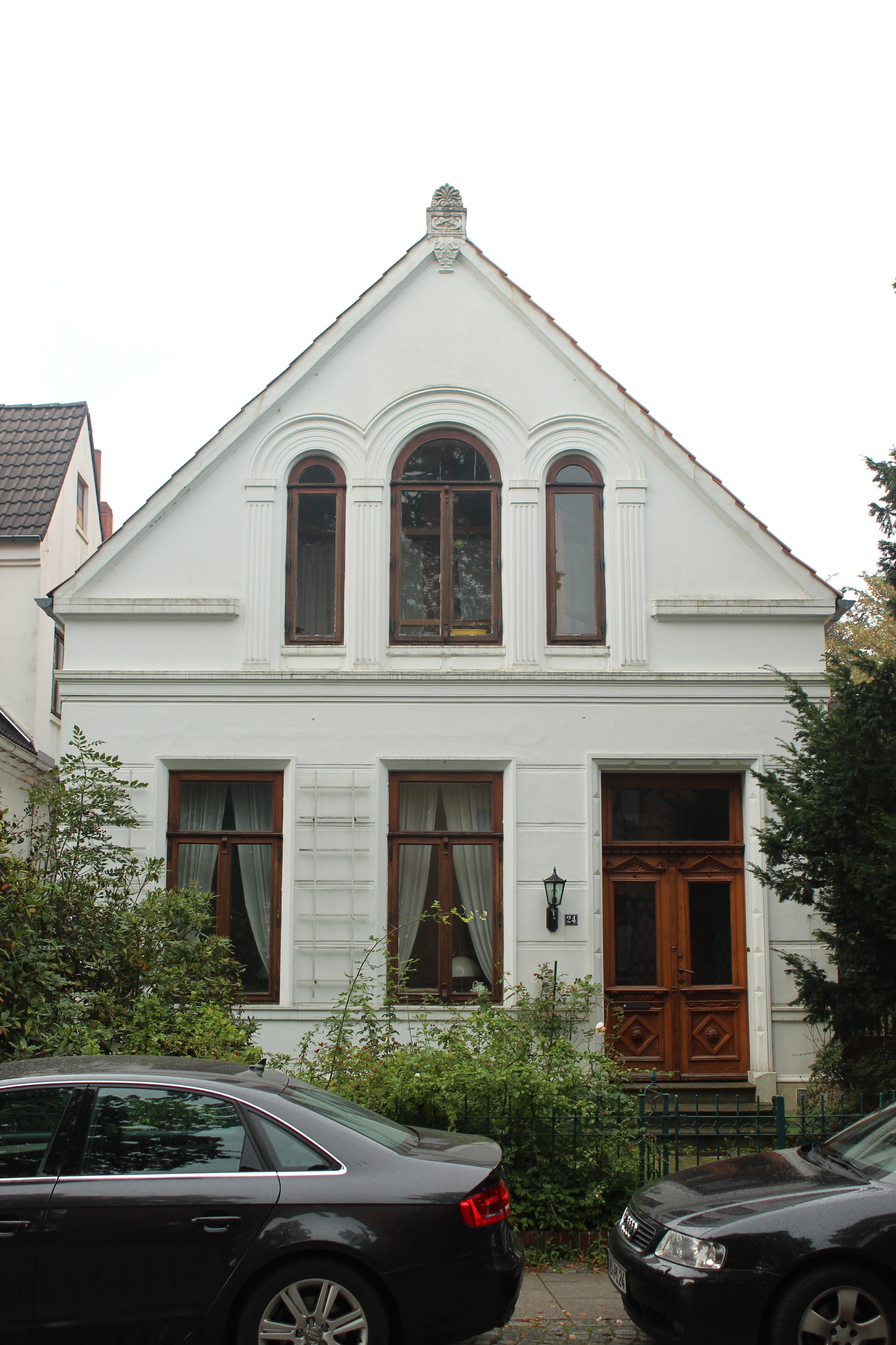 Haus Kapitän Schilling in Bremen, Weserstraße 24.Das abgebildete Objekt ist ein geschütztes Kulturdenkmal in der Freien Hansestadt Bremen, mit der Nr. 1322 beim Landesamt für Denkmalpflege registriert.